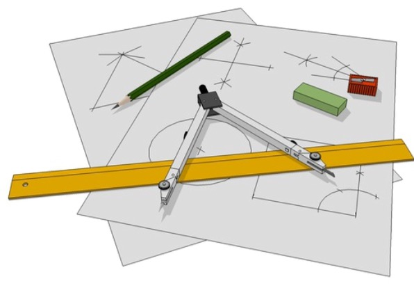 ruler-and-compass